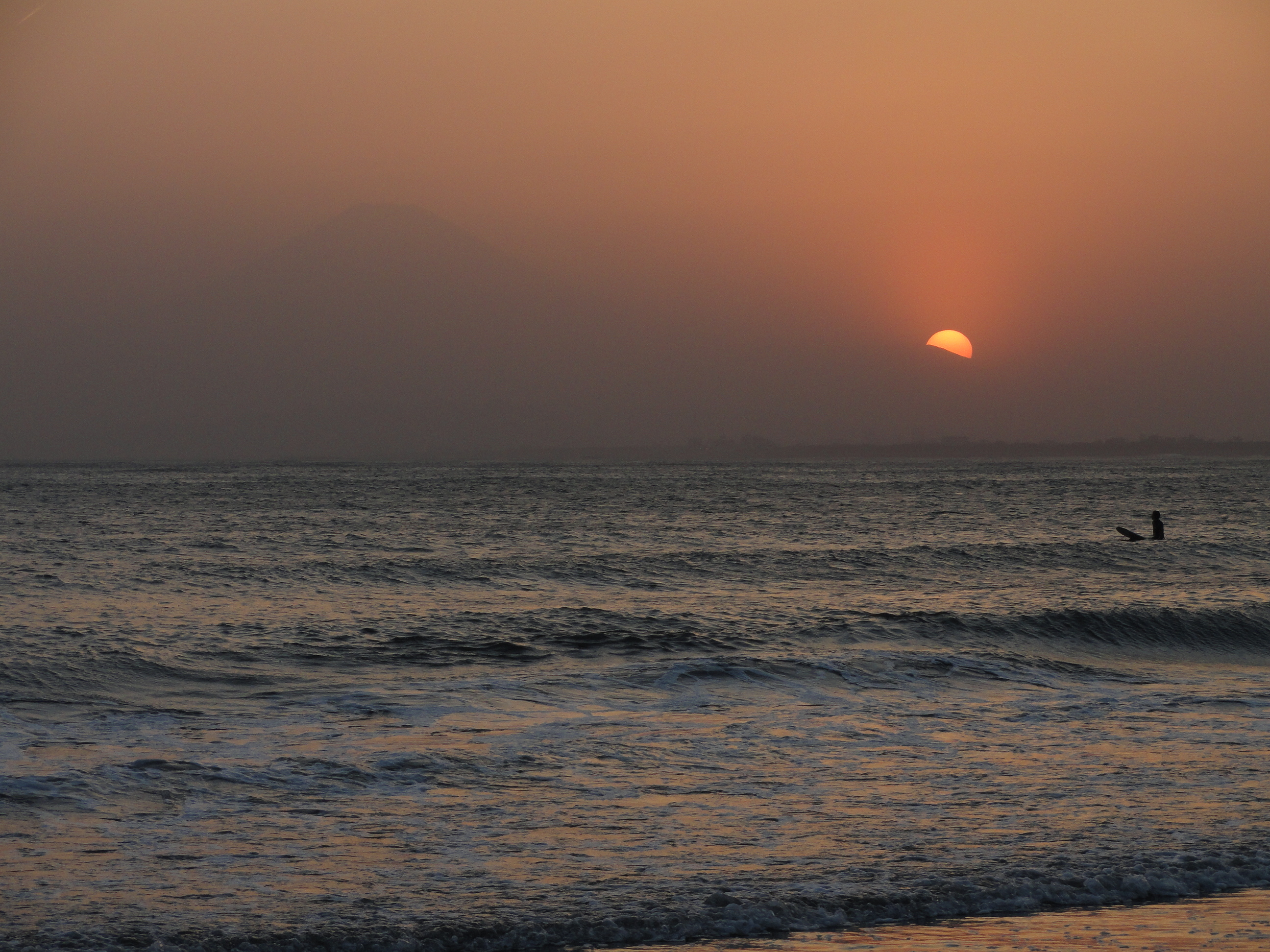 von mir selbst fotografierte Landschaftsaufnahme